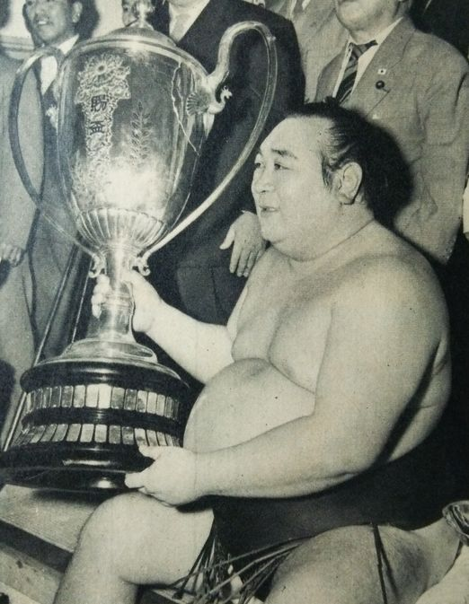 鏡里